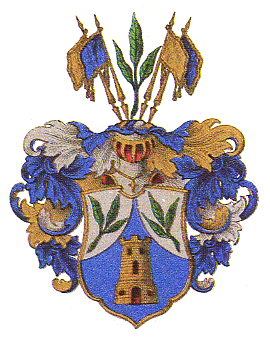 Vaakuna